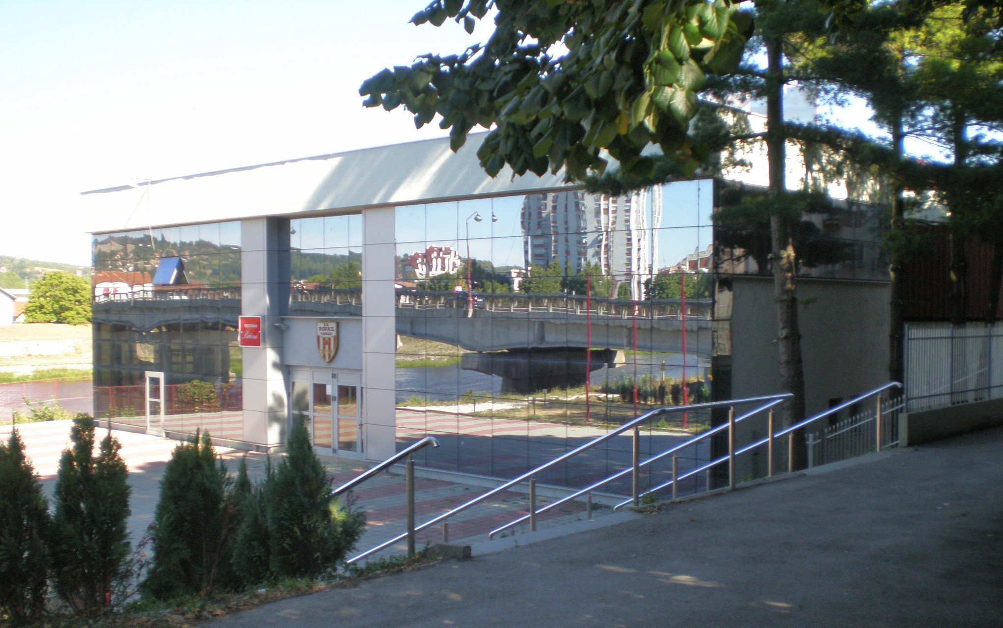 Хала Борца крај Мораве или само Хала крај Мораве је спортски објекат у Чачку и хала у којој игра КК Борац као домаћин. Капацитет хале је имеђу 2.500 и 4.000 људи и налази се поред Западне Мораве, по којој је добила име.